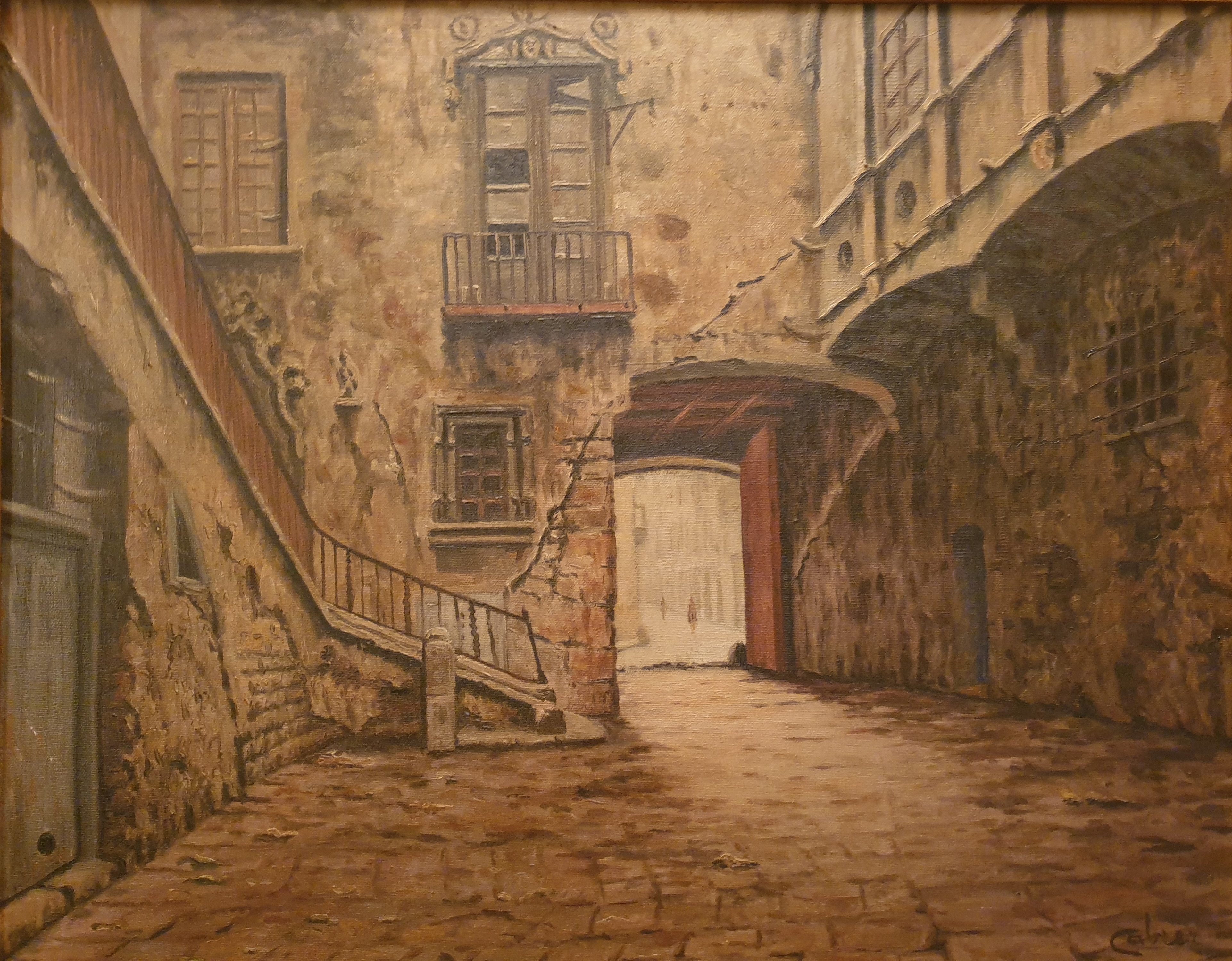 Escala descoberta del Palau Aguilar a Barcelona